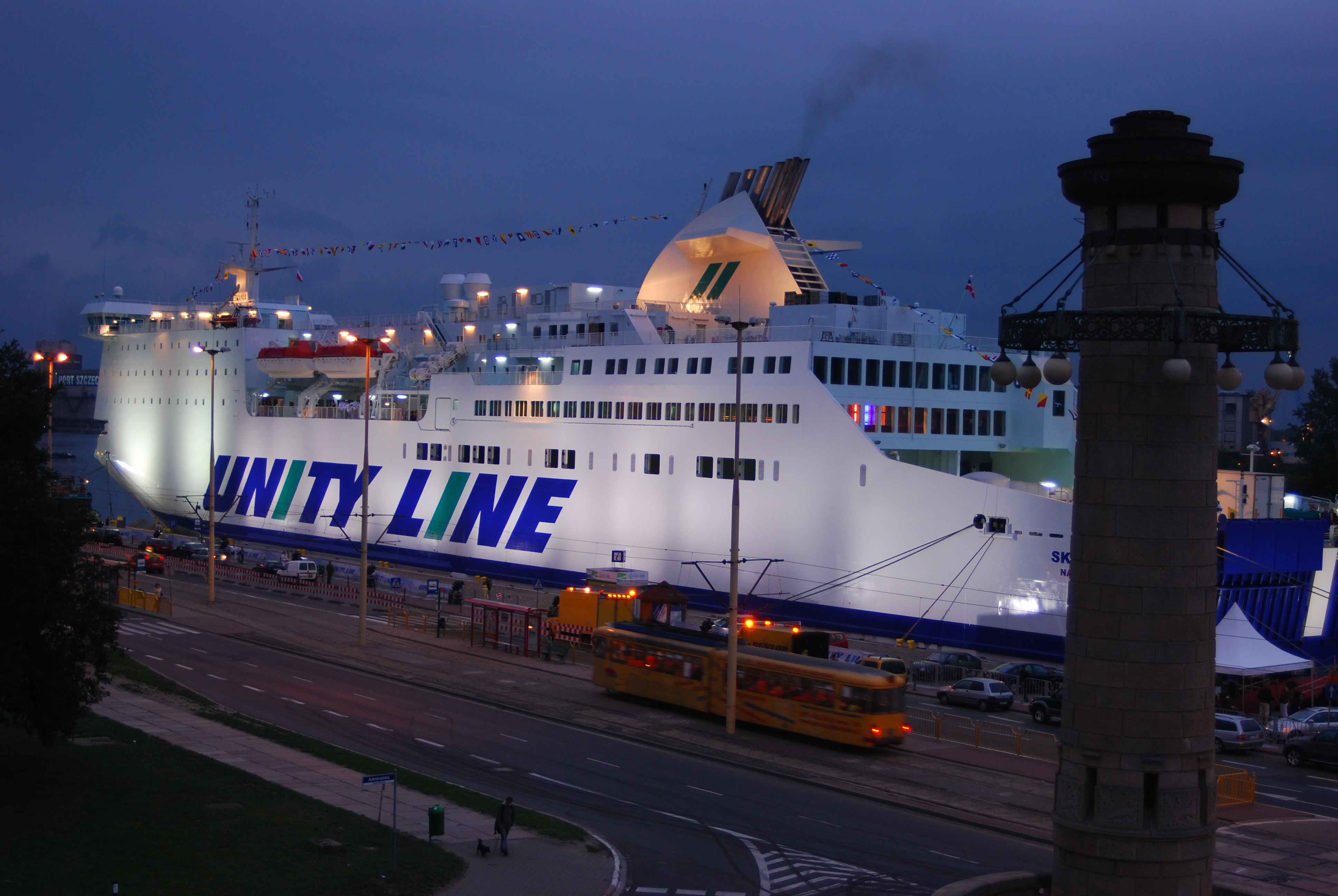 MF Skania, dawniej Superfast I oraz Eurostar Roma